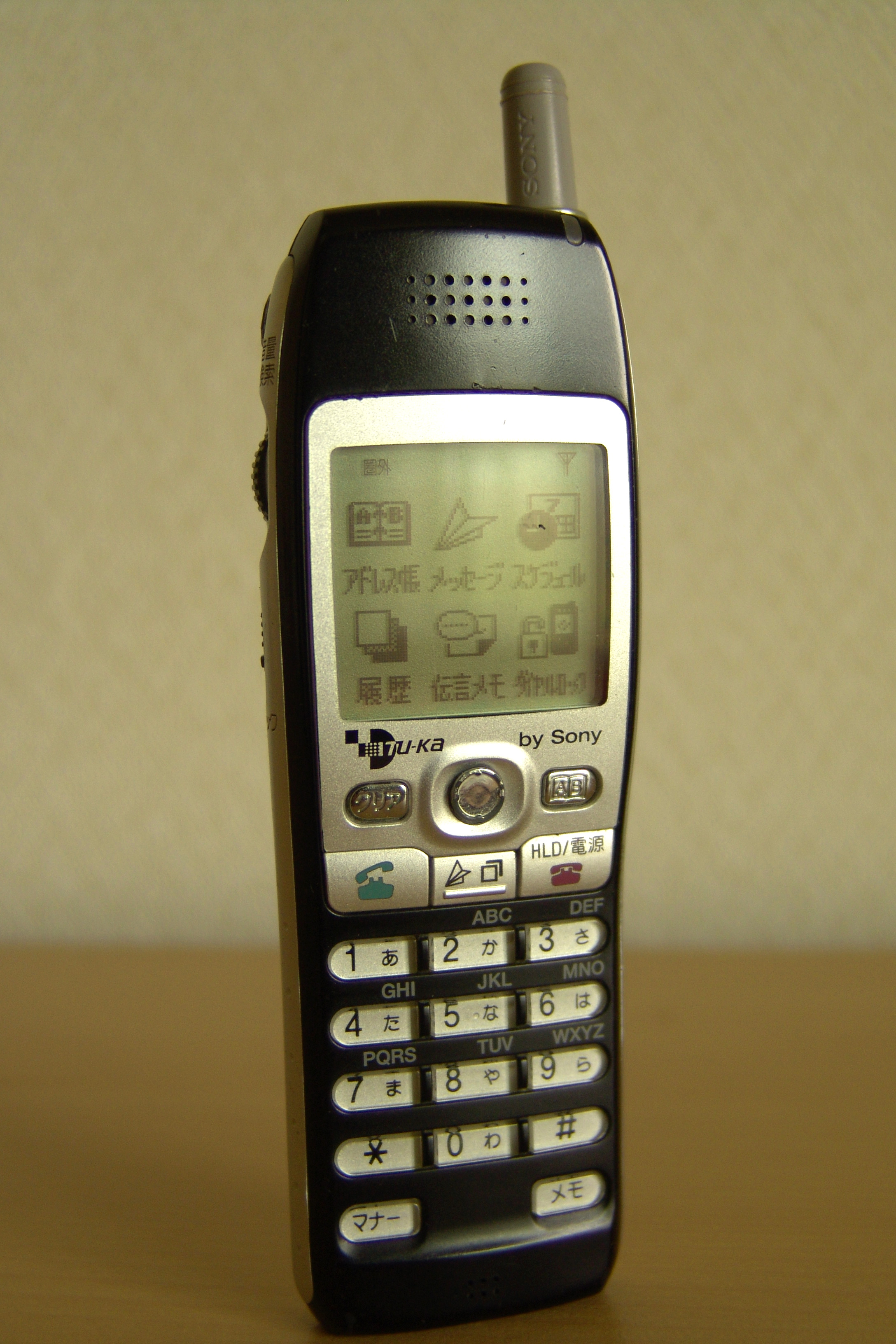 99年、当時のデジタルツーカーからリリースされたソニー製TH291。66gと兎に角軽いのが特徴。当時、ストレート携帯にありがちだったポッケに入れていたときに間違ってボタンが押ささる（長押しロックも解除されちゃう）誤動作をスライド式のロックスイッチで防いだのは素晴らしい。 いわゆる「くるくるピッピッ」携帯で、ジョグダイヤルがエラく使いやすかった。右に回す、左に回す、押す、奥側に押す、の４方向に動くのと、そのハードウェアの動きをうまく導くソフトウェアの優秀さが合わさった名機です。 本体はシルバーだったのをブラックに交換。この携帯は長らく愛用しました。